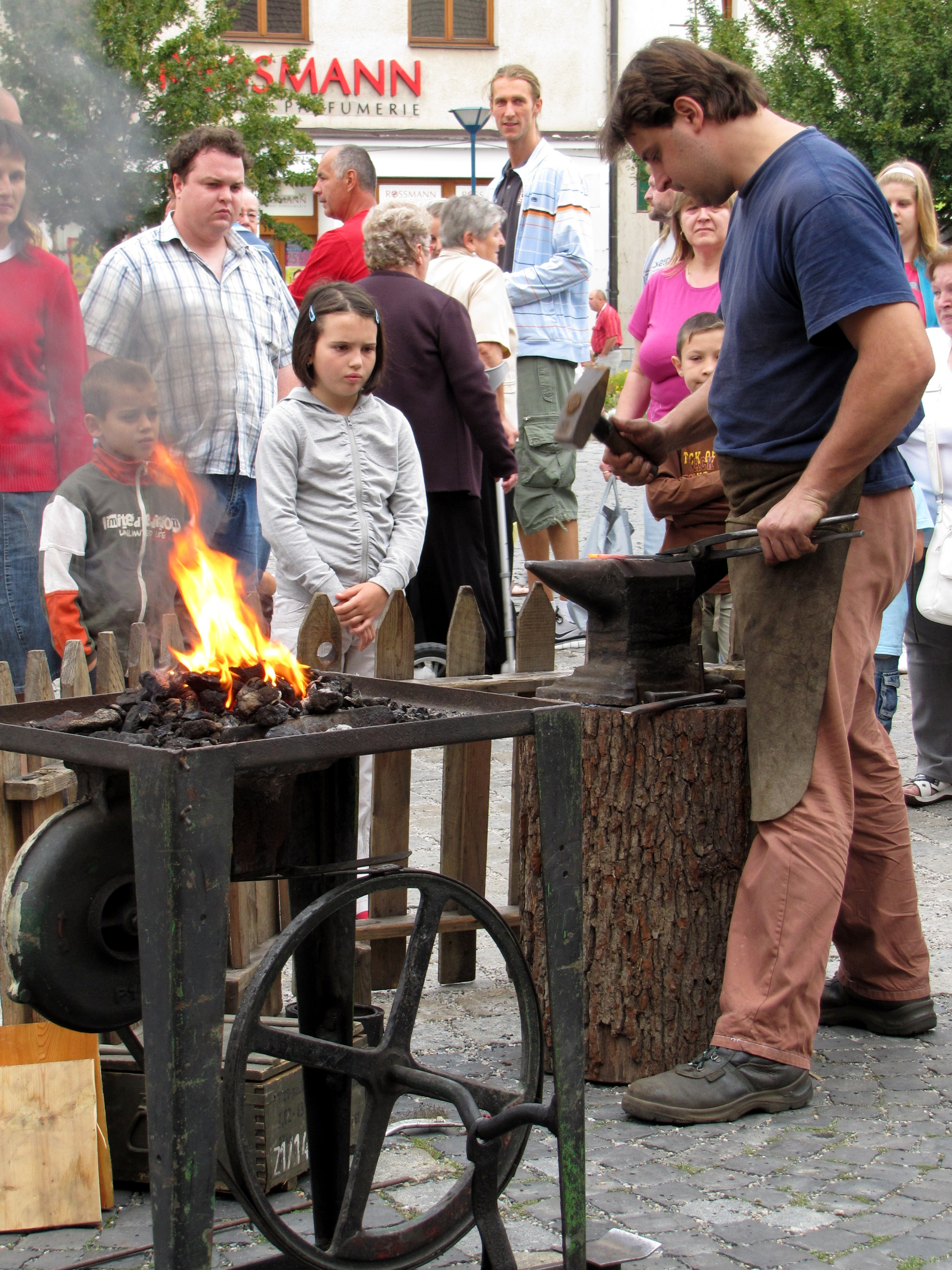 Jarmark při Slováckém roku 2011 v Kyjově